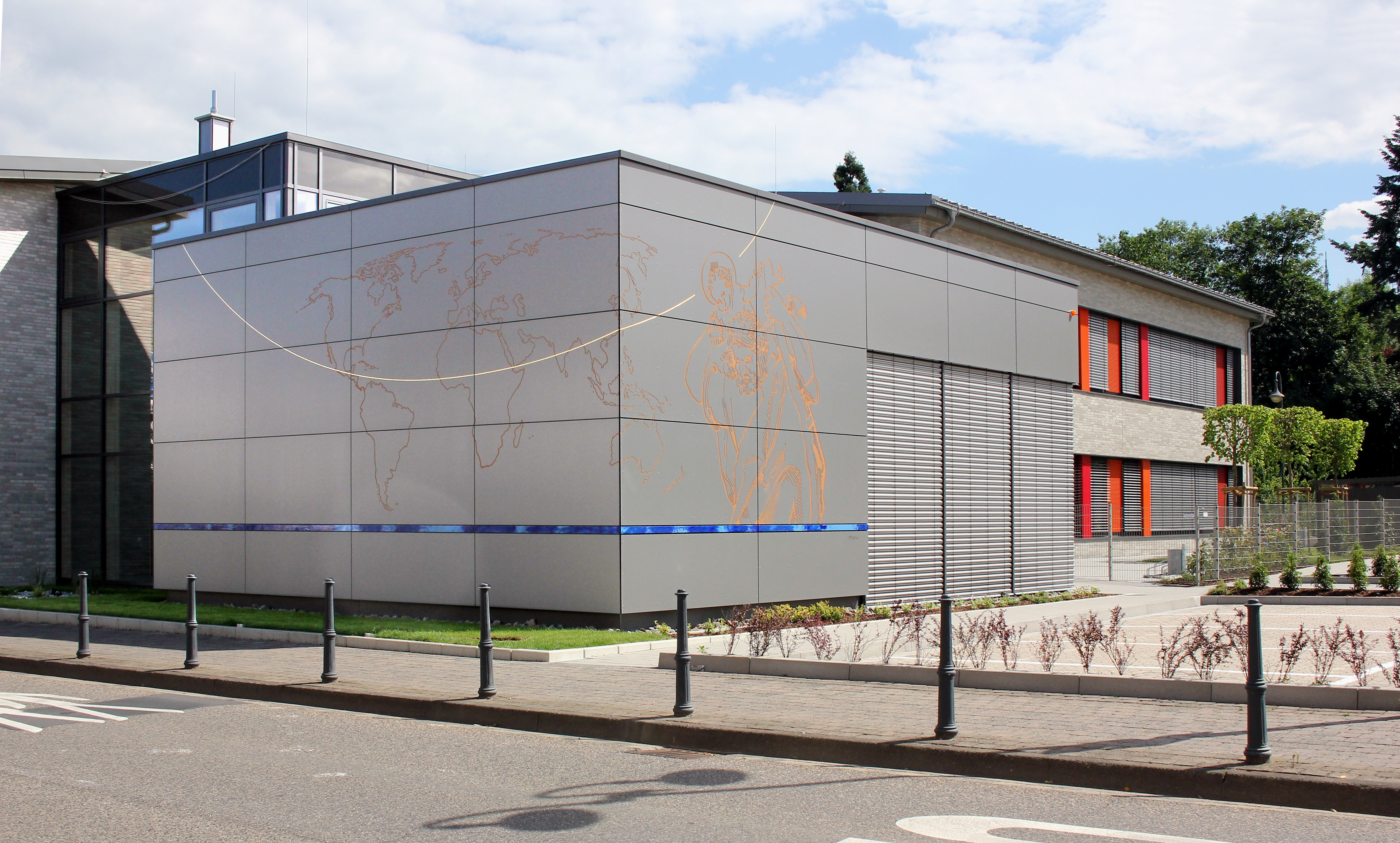 Grundschule Christophorus Kärlich, Nordwestseite, mit Weltkarte und Christophorus von Elke Pfaffmann und Stefan Kindel, Künstlergemeinschaft in Offenbach an der Queich